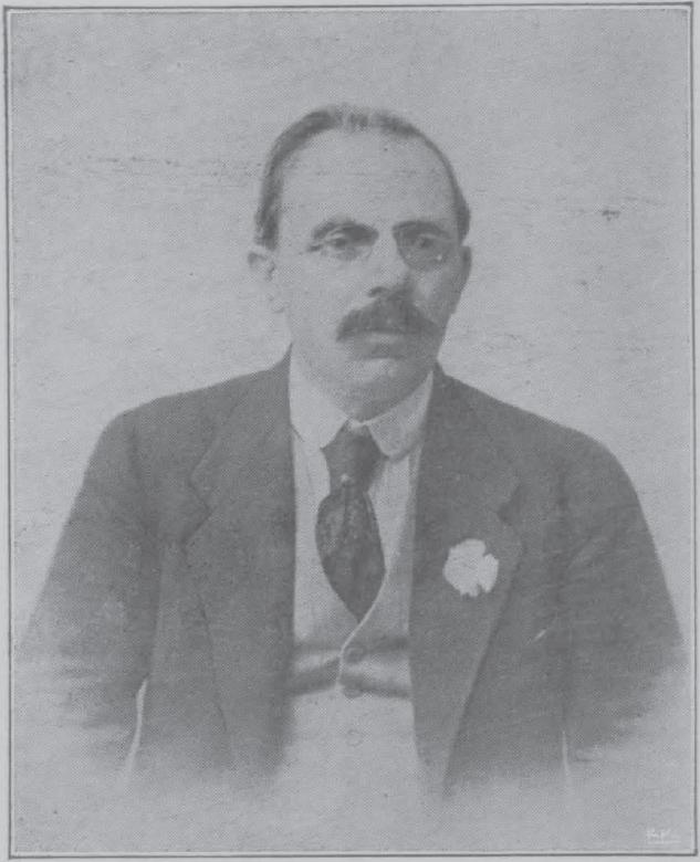 griechischer Bänker, 19.-20. Jahrhundert